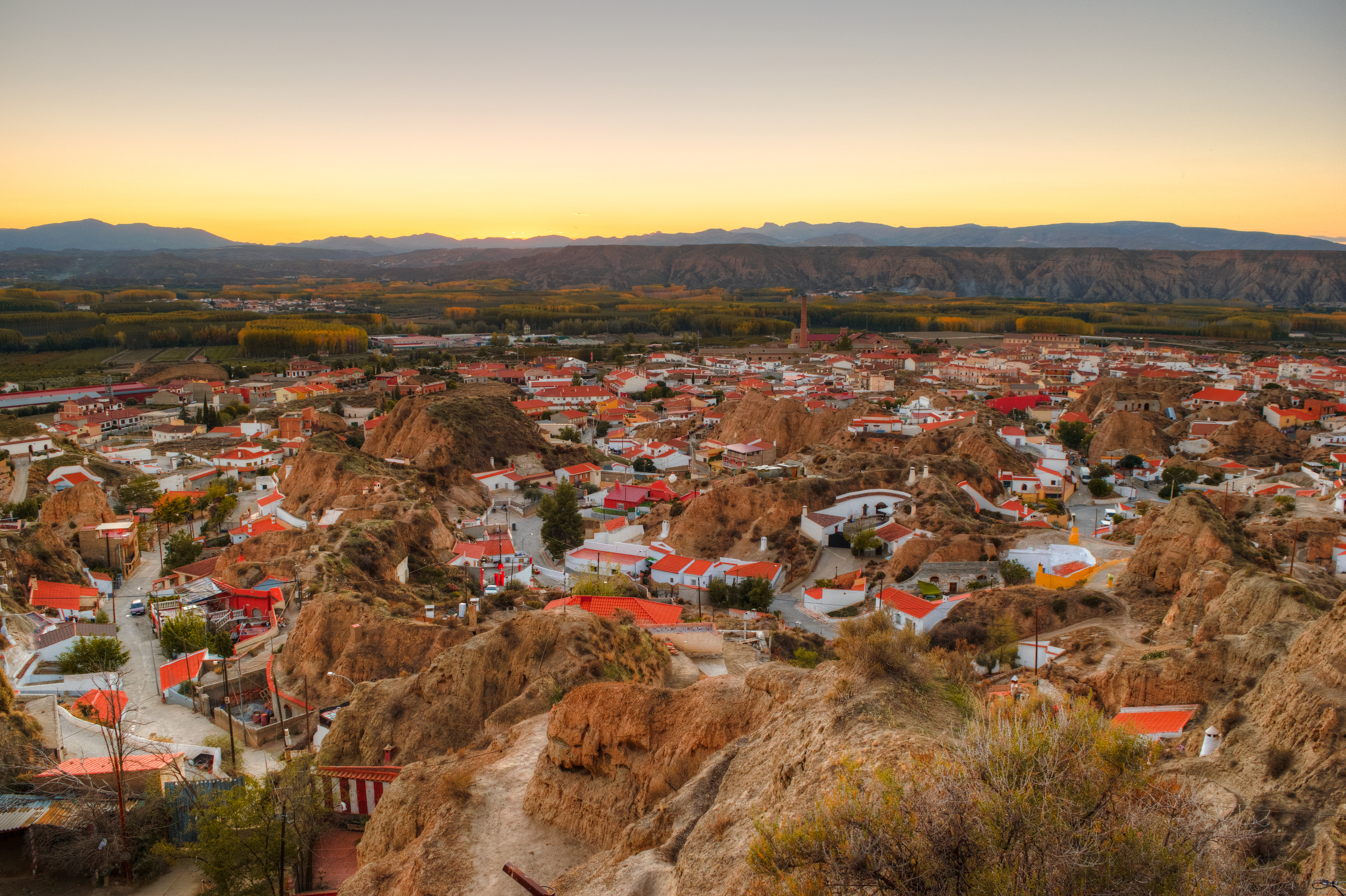 Desde el mirador de Benalúa